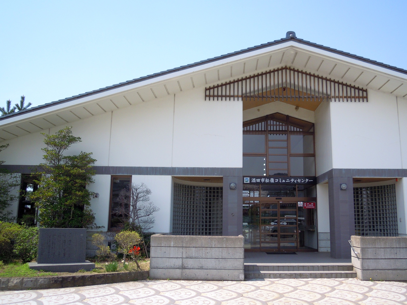 山形県酒田市にある松嶺コミュニティセンターの外観。館内に酒田市立図書館松山分館がある。